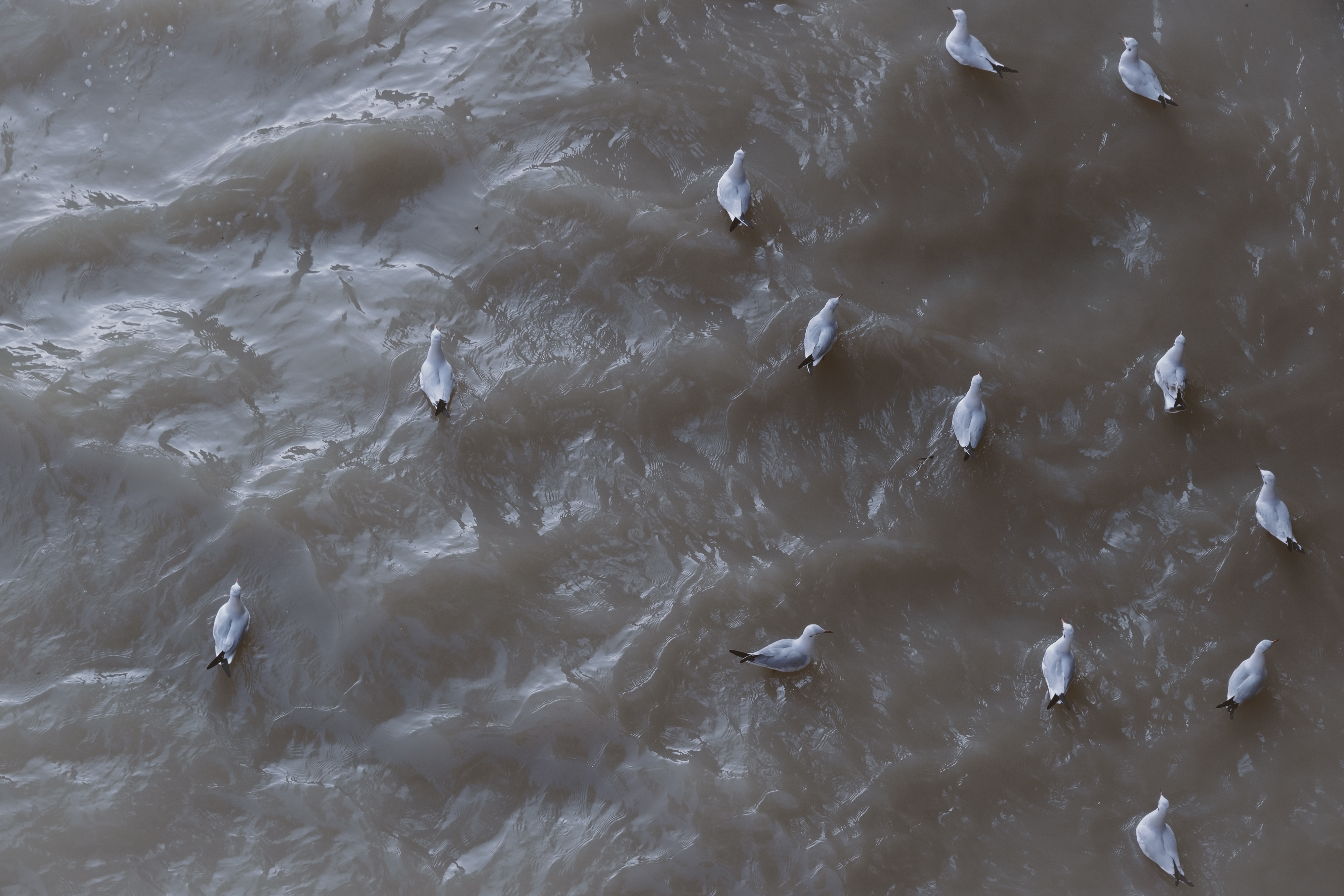 الحيوانات وتسمى أيضًا باسم "المَتْزَوِيّات" أي الحيوانات عديدة الخلايا. هي كائنات حقيقيات النوى ومتعددة الخلايا تشكل المملكة البيولوجية الحيوانية.